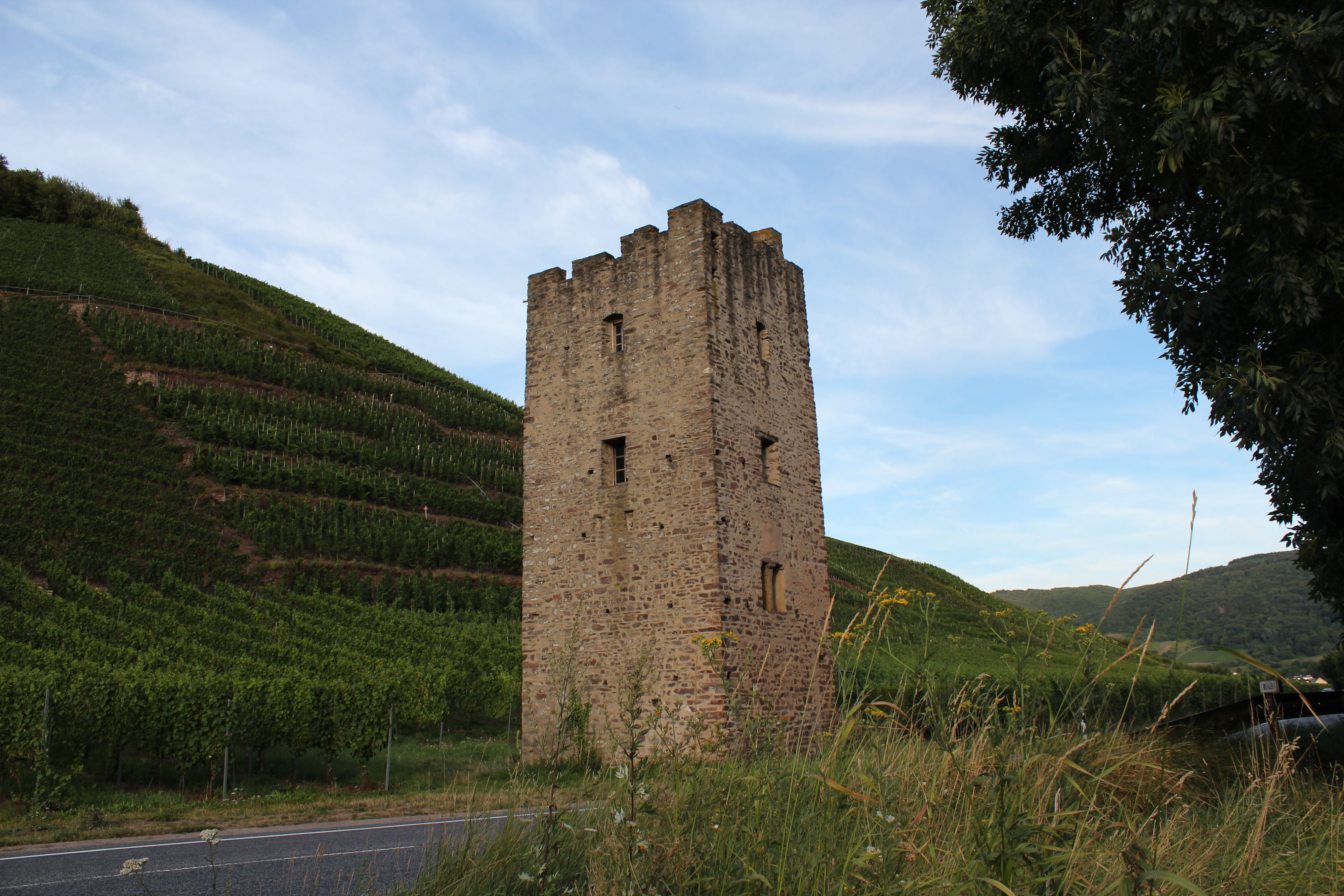 Romanischer Wohnturm des ehemaligen Hofguts Lehmen an der Mosel. Der Turm hat eine Höhe von ca. 16 Meter und steht auf dem Gebiet der in der Gemeinde Ediger-Eller, Er wurde wahrscheinlich um das Jahr 1234 erbaut